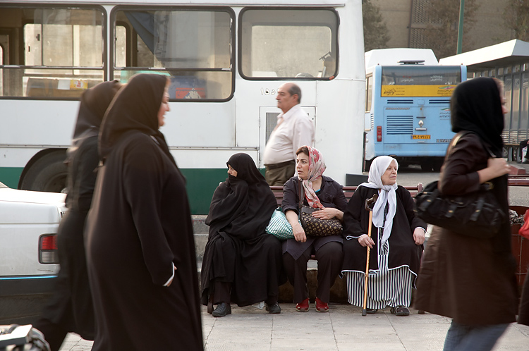 Women in Tehran.